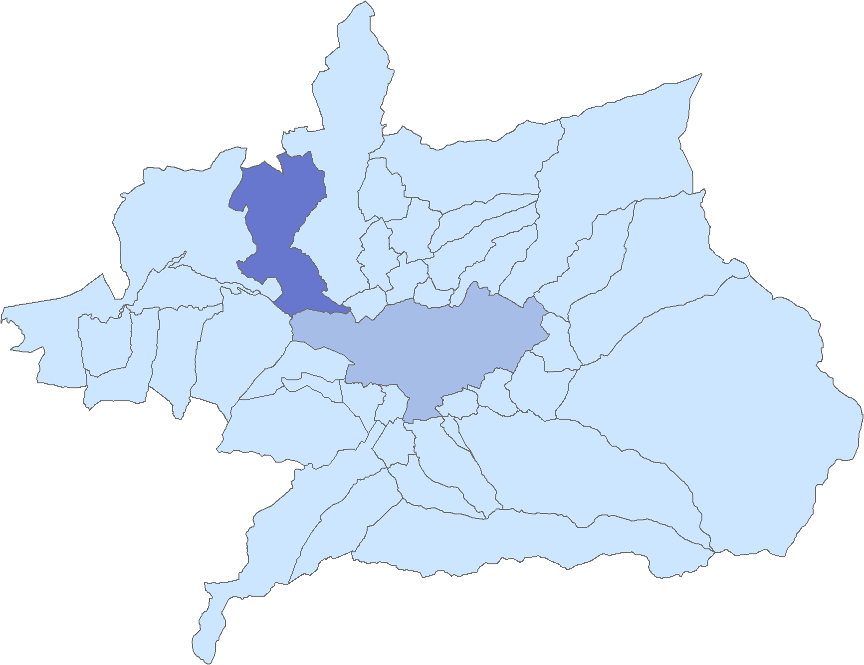 Situación del municipio de Atarfe respecto a la comarca de la Vega de Granada, en España.